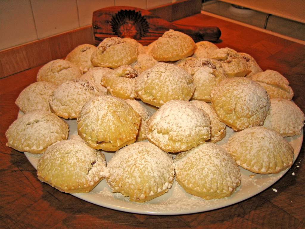 ricetta/recipe di Imercola anche su con ripieno di datteri o di noci MAMOUL 16 cucchiai di burro sciolto 1 tazza di farina 2 tazze di semolino 1/4 cucchiaino di sale 1/4 cucchiaino di lievito 1/4 tazza di zucchero 1 cucchiaio di acqua di fiori di arancio 7 cucchiai di acqua zucchero a velo per spolverarli Ripieno di Noci:* 1 1/2 tazza di noci 2 cucchiai di acqua di fiori di arancio 1/4 tazza di zucchero 1/4 cucchiaio di cannella 1 cucchiaino di miele Ripieno ai datteri: in proporzione 300 gr datteri e 3 gr burro (1 tazza = 225 gr 1 cucchiaio da tavola = 15 gr/ml) Tritare insieme tutti gli ingredienti, finche' risultano ben amalgamati. Mescolare farina, semolino, sale, lievito, burro e zucchero insieme. Unire l'acqua di fiori coi 7 cucchiai di acqua e bagnare l'impasto. L'impasto dovrà essere abbastanza compatto da poter formare delle palline che possano essere inserite nello stampo. Fatelo riposare per alcune ore. Prendete un pezzo di pasta della grandezza di un piccolo limone, stendetelo sottile ed inserire un bel cucchiaio di ripieno al centro dell'impasto ben appiattito in precedenza. Cuocere a 170°C per 20' finchè i biscottini risulteranno leggermente dorati. Cospargere di zucchero a velo prima di servire.